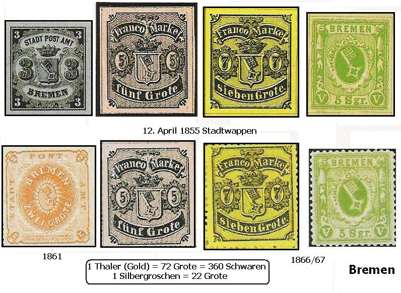 Bremer Postwertzeichen Mi. 1,2,3,4 (upper row), Mi. 5,7,13,15 (lower row)